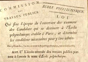 Loi du 15 Fructidor an III fixant l'appellation de l'École polytechnique.